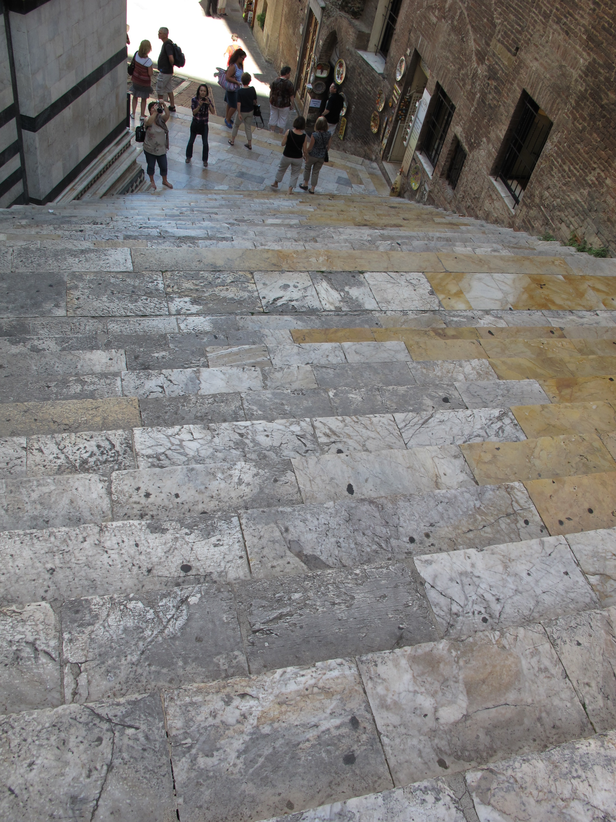 Scalinata duomo-battistero di siena